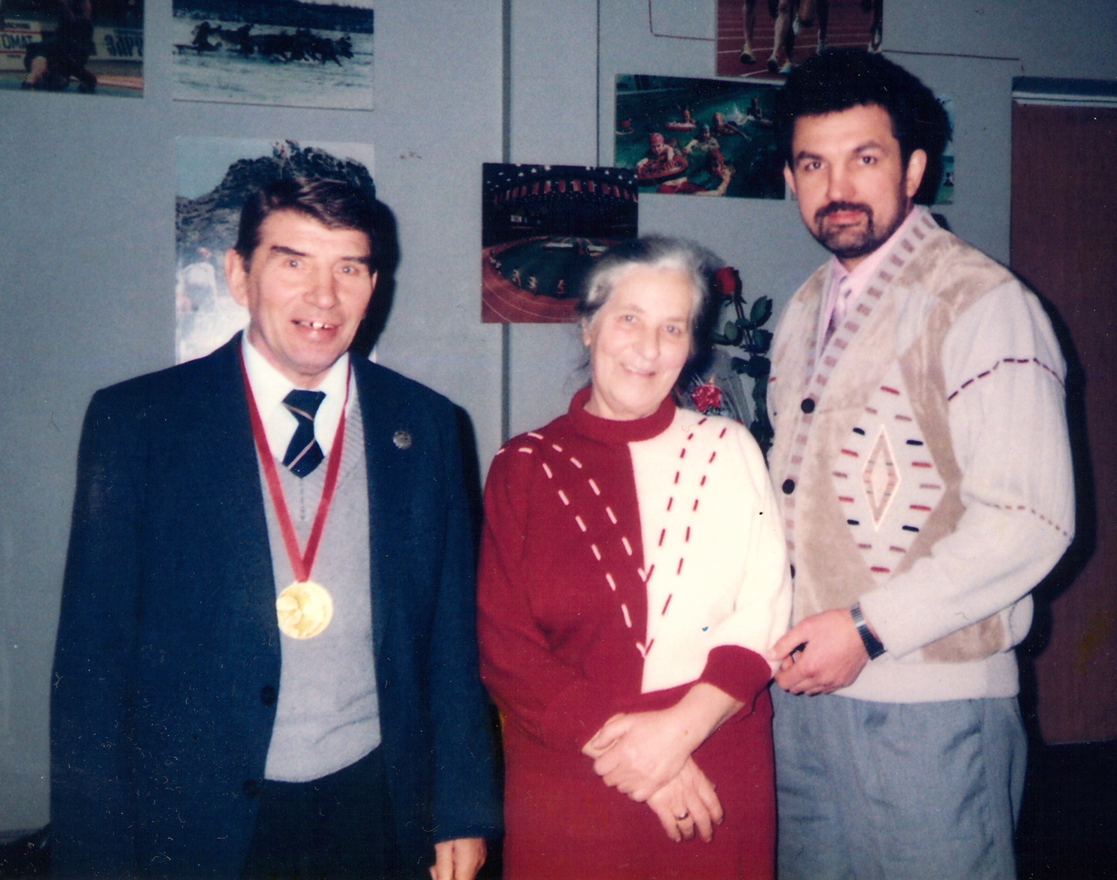 Торжественный вечер, посвященный шестидесятилетию Панькина В. К. Зал ШВСМ, г. Воронеж.